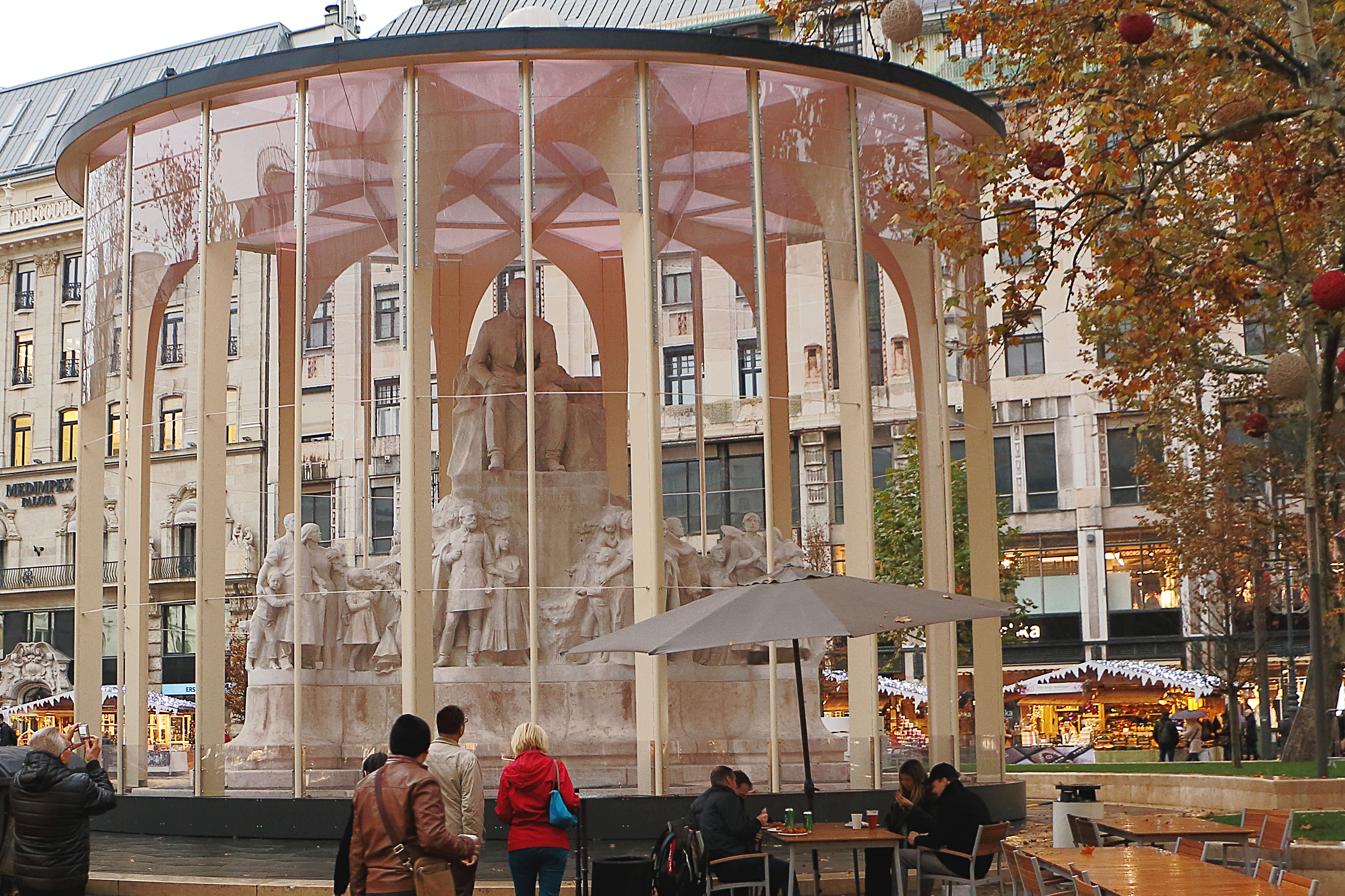 A Vörösmarty-szobor téli védőpavilonnal